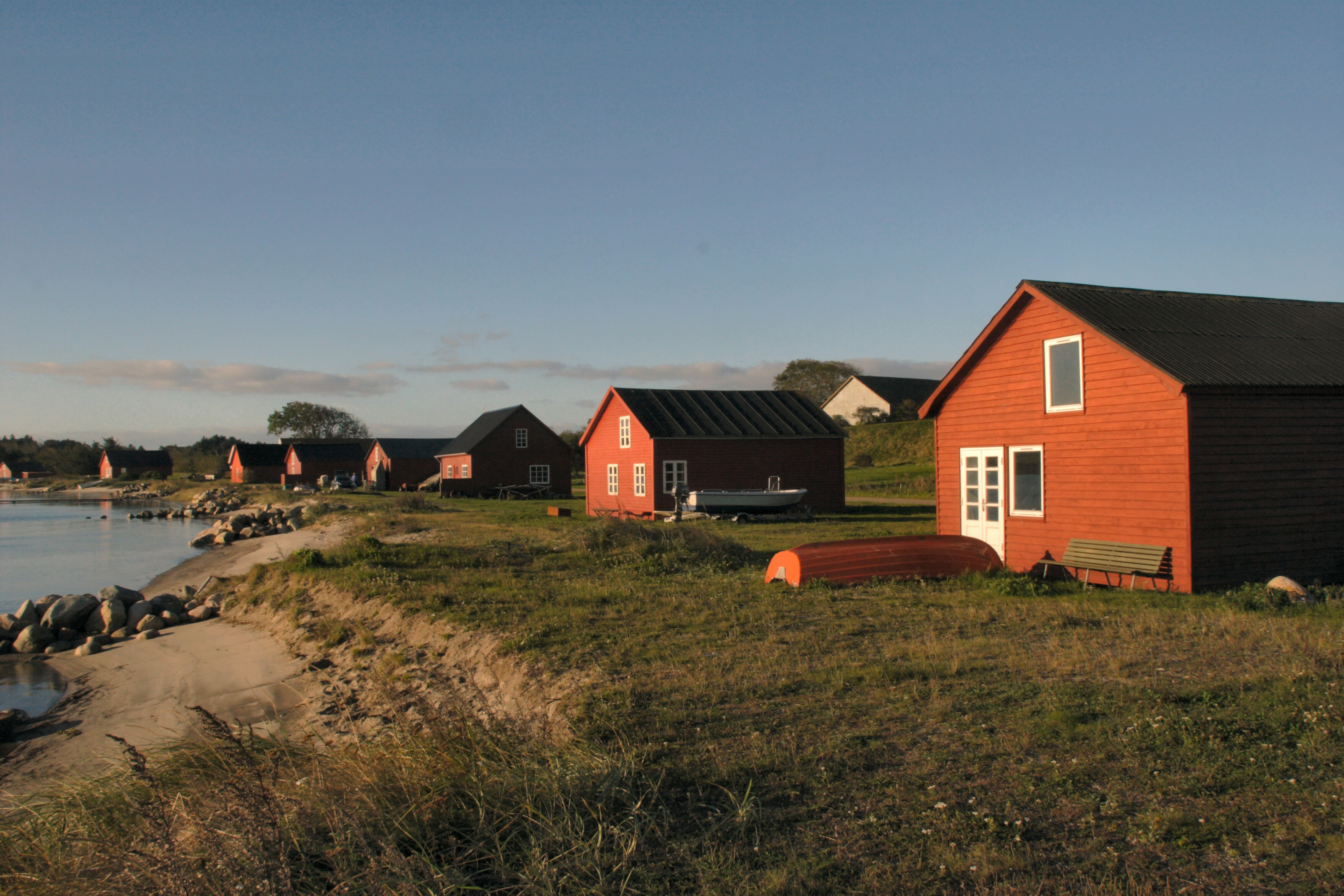 Humlum fiskerleje